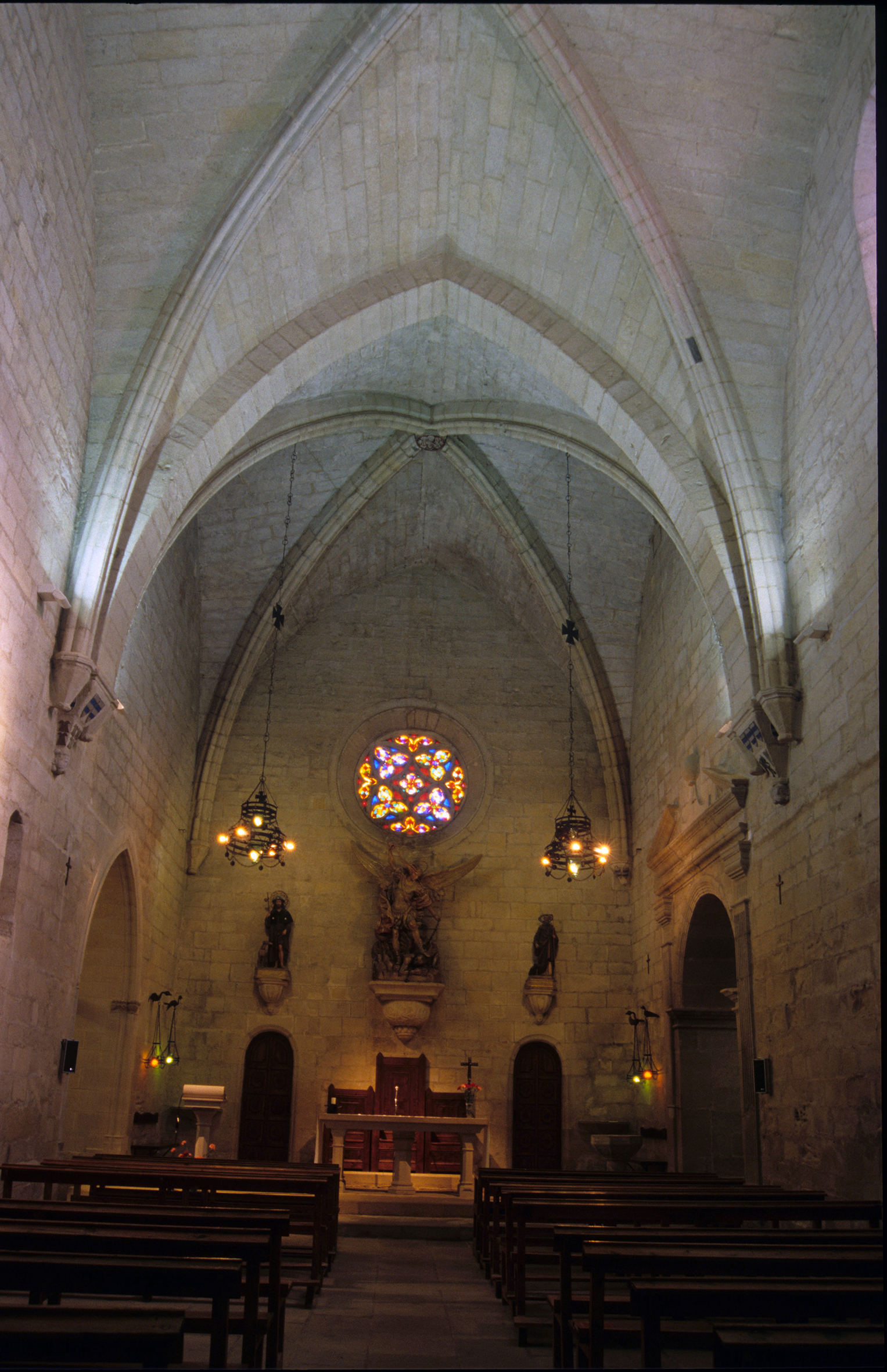 Iglesia Parroquial de Ciutadilla (Urgell), Catalunya